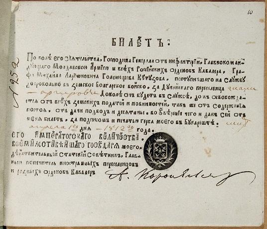 БИЛЕТ, ВЫДАВАЕМЫЙ БОЛГАРСКИМ ПЕРЕСЕЛЕНЦАМ И ПОДПИСЬ АНТОНИО ЯКОВЛЕВИЧА КОРОНЕЛЛИ. ЛИЧНЫЙ АРХИВ ДЖУЛИИ КОРОНЕЛЛИ